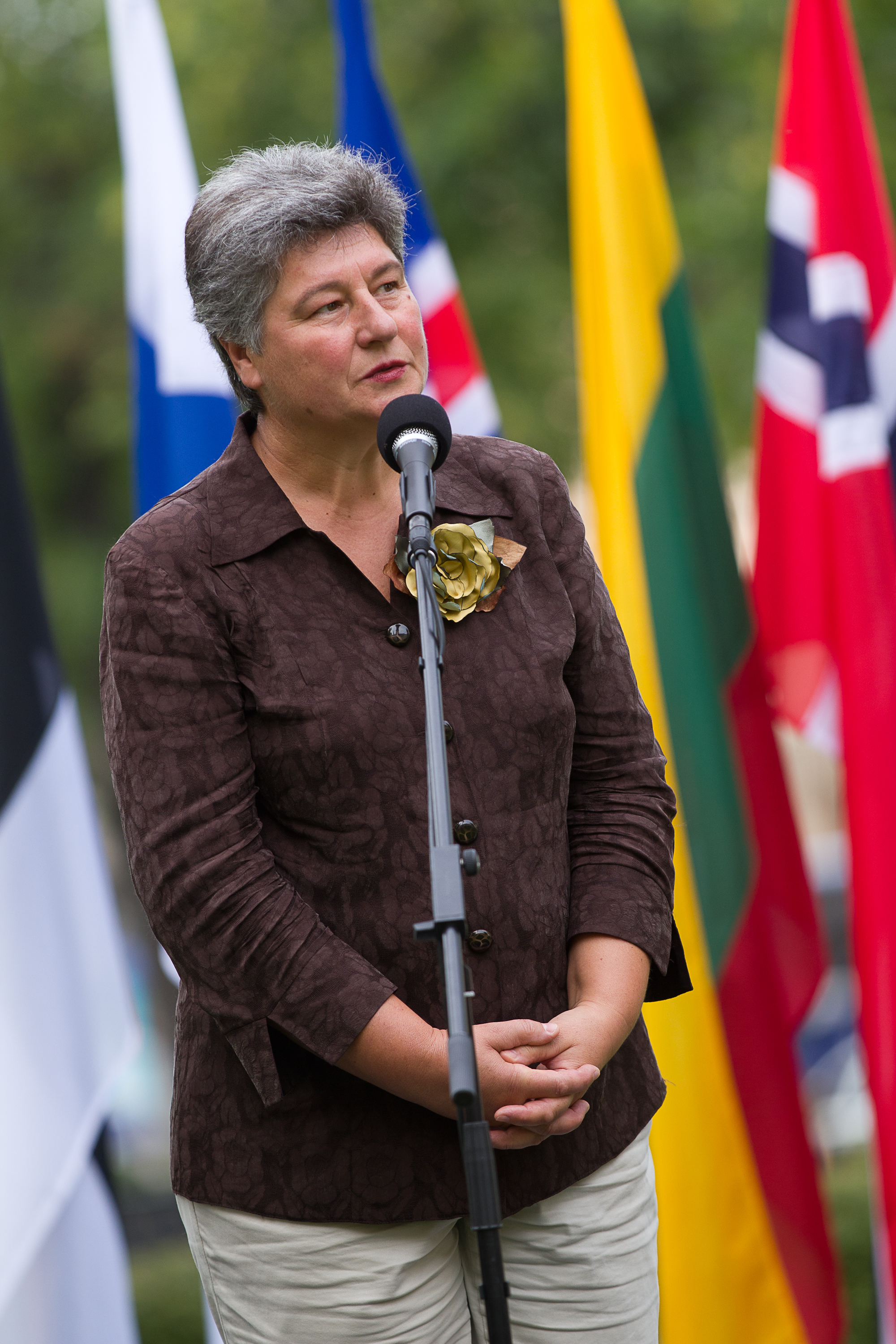 2011.gada 21.augusts. Baltijas un Ziemeļvalstu parlamentu priekšsēdētāji kopā ar Augstākās padomes deputātiem stāda kociņus Jēkaba laukumā pie Saeimas nama par godu Latvijas Republikas valstiskās neatkarības atjaunošanas 20.gadadienai. Attēlā: Lietuvas Neatkarības deklarācijas kluba prezidente Birute Vaļonīte (Birutė Valionytė). Foto: Ernests Dinka, Saeimas Kanceleja.